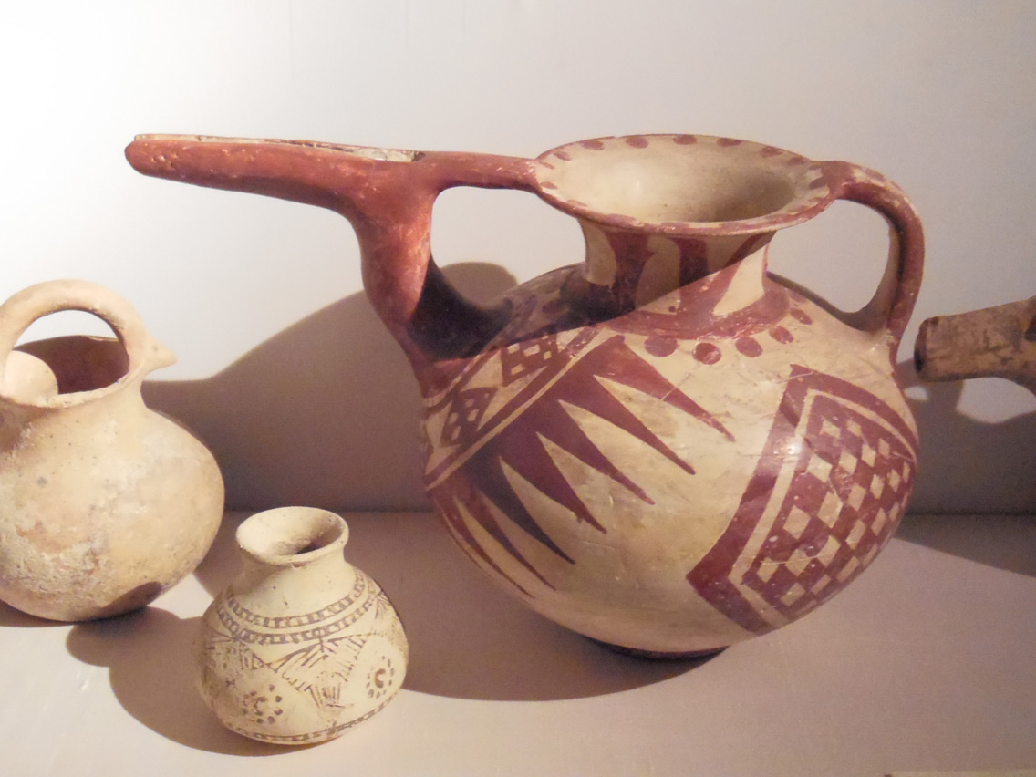 Roma, Museo nazionale di arte orientale (palazzo Brancaccio). Olla con versatoio a becco di uccello in ceramica dipinta. Dalla necropoli di Tepe Siyalk B, età del Ferro III (800-650 a.C.)